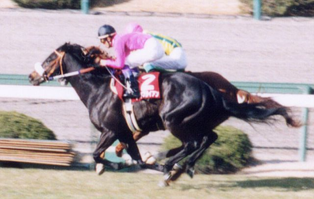 ナリタブライアン 撮影日: 1996年3月9日 撮影場所: 阪神競馬場